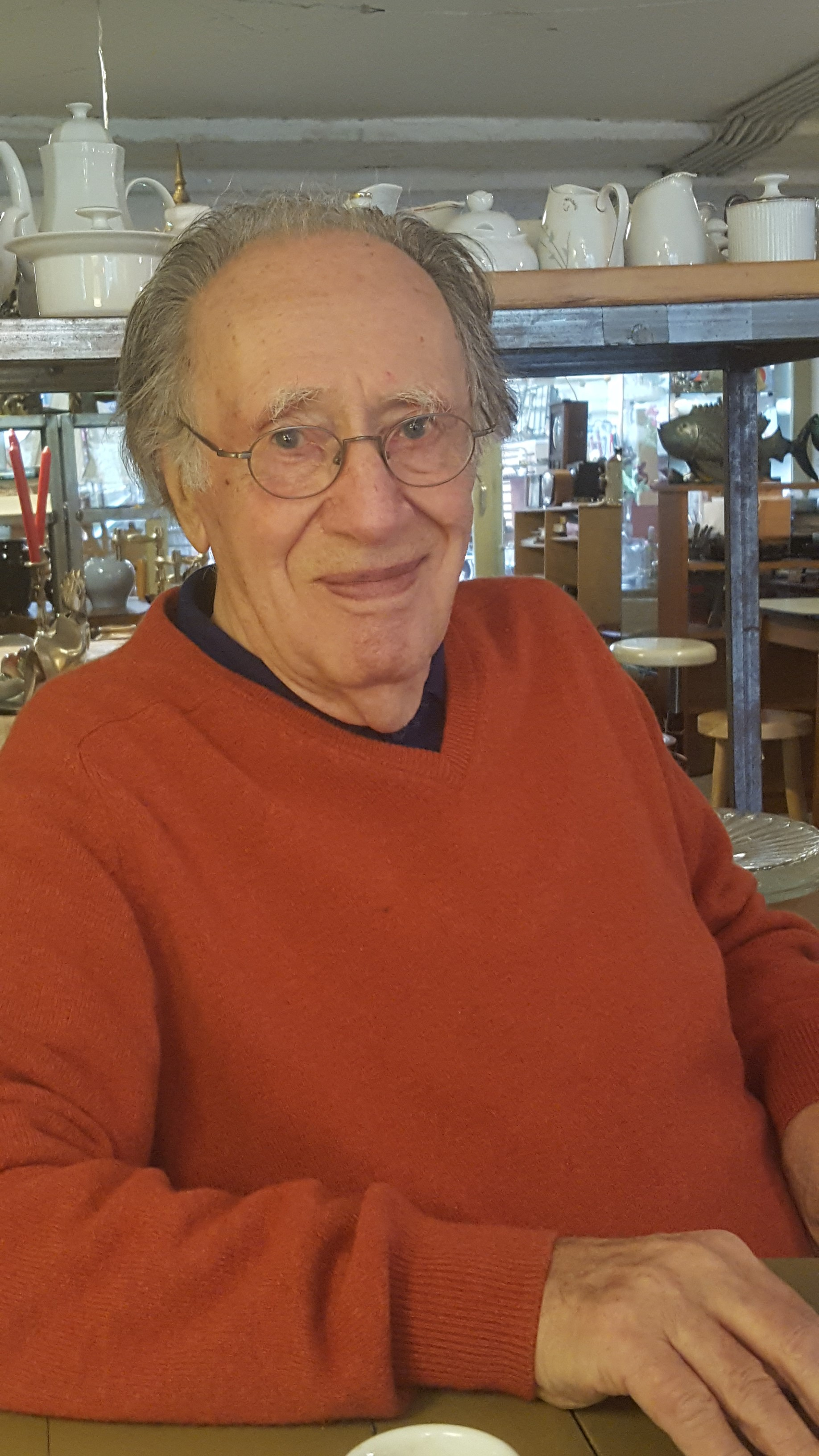 Jan Boerman